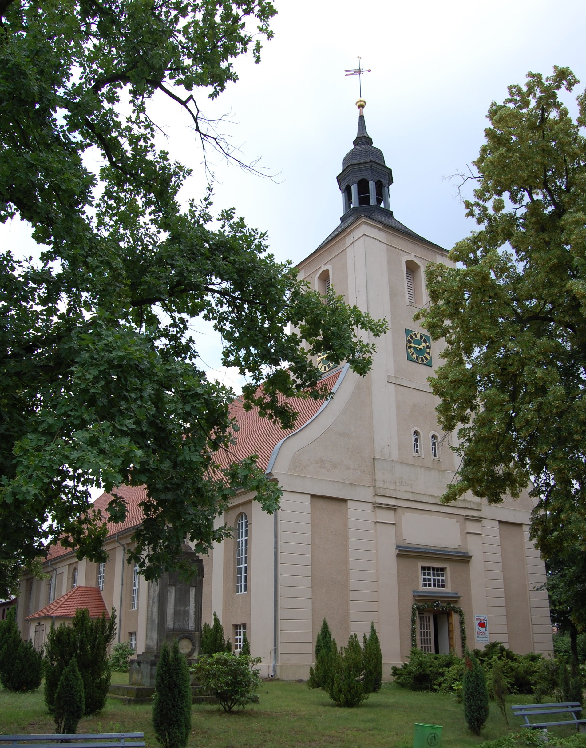 Kirchturm der Pfarrkirche Burg (Spreewald)